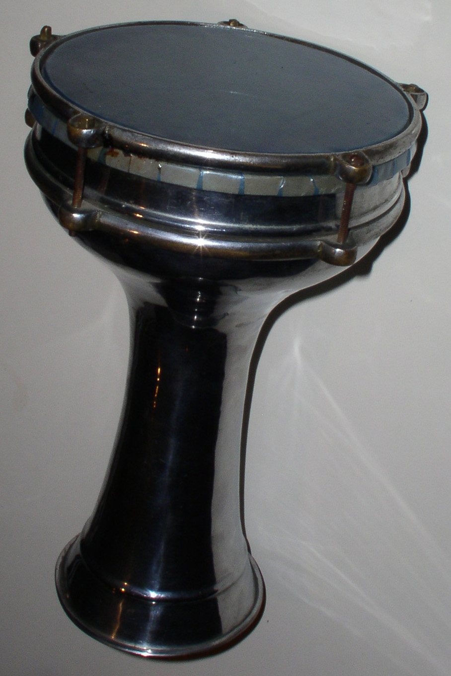 Darbuka turca de metal Darabuka / tarabuka Turkish copper vasedrum own picture